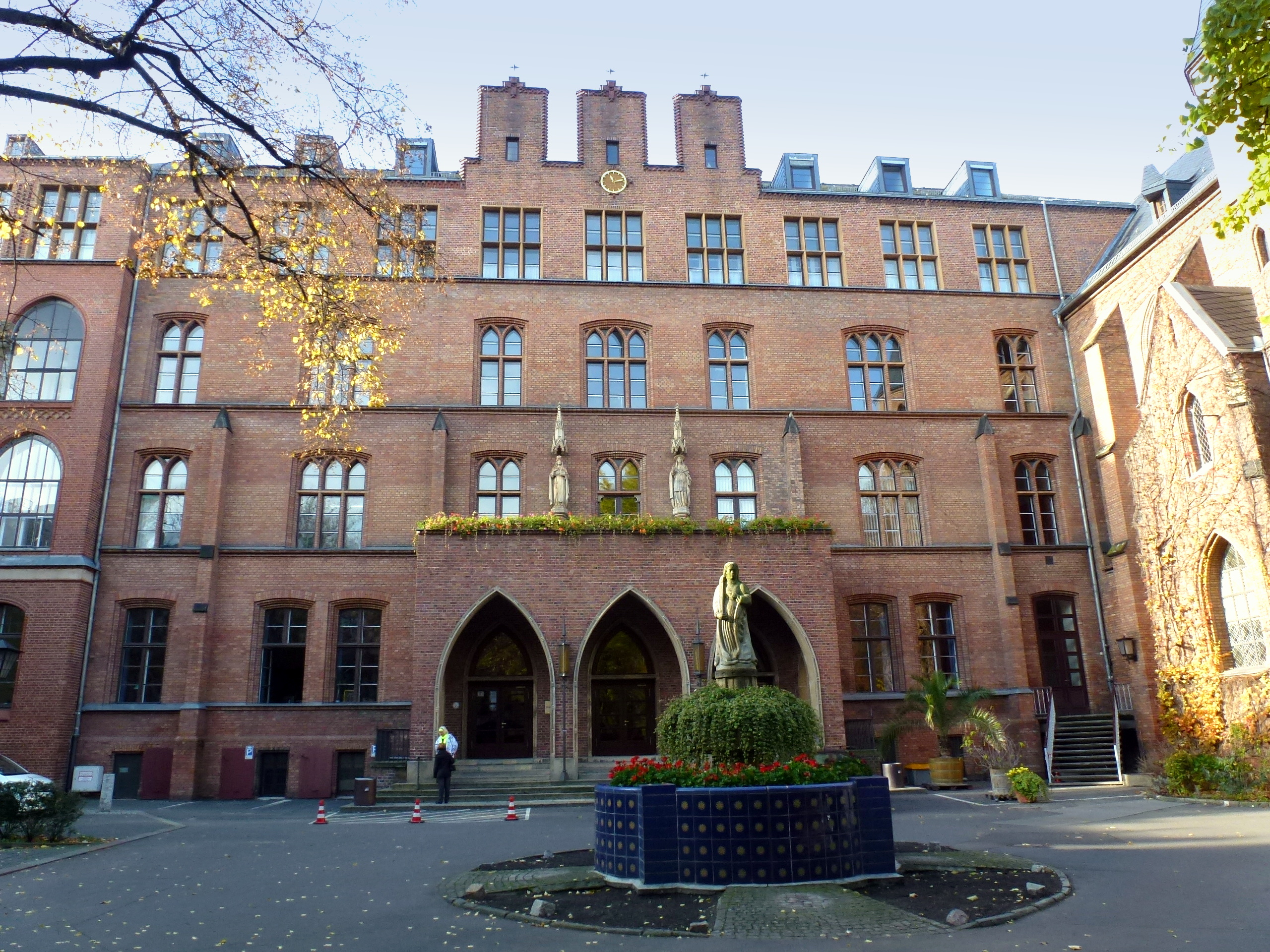 Mitte Große Hamburger Straße St. Hedwig-Krankenhaus Hof mit Brunnen der hl. Agatha